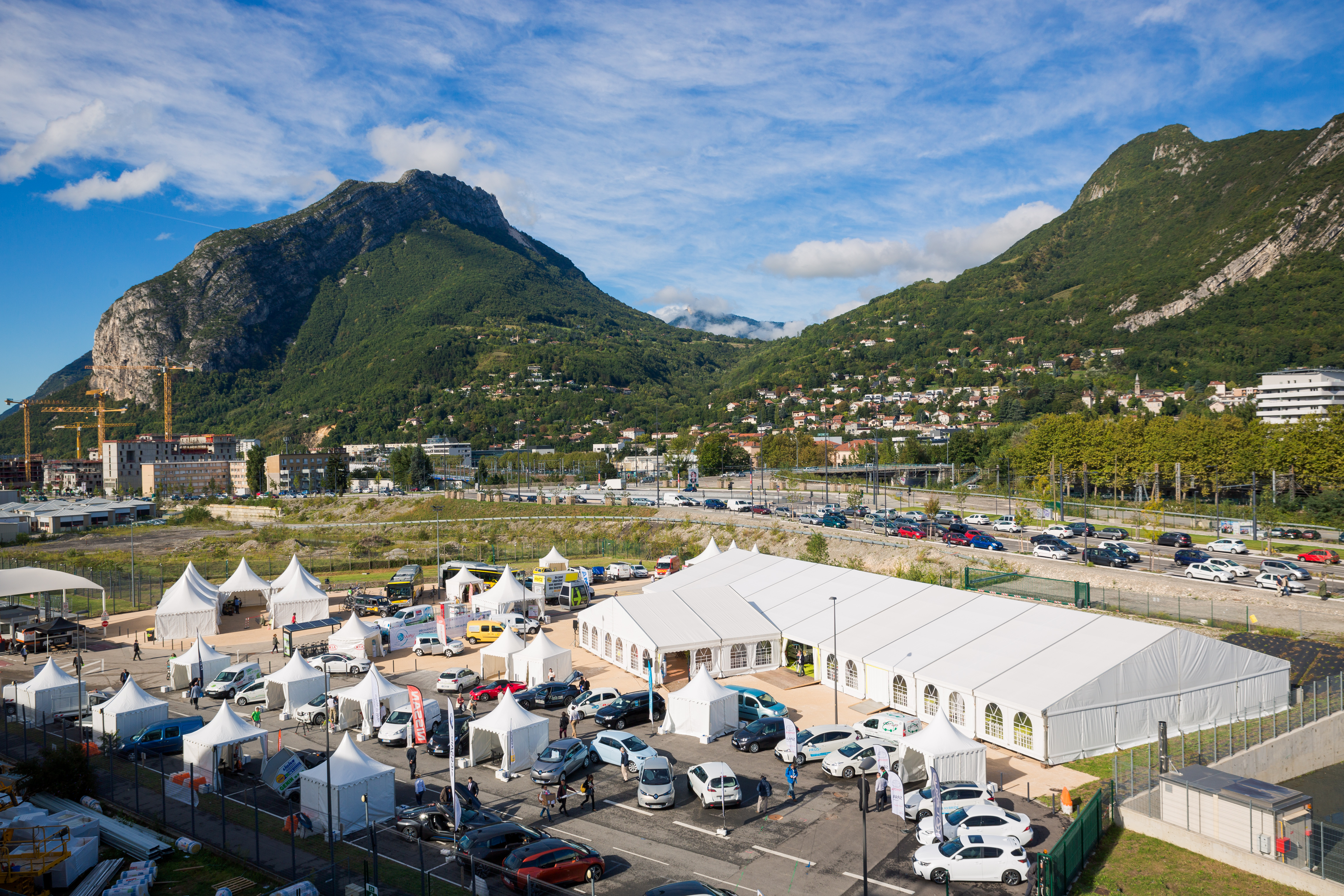 Vue d'ensemble Journées Mobilité Durable